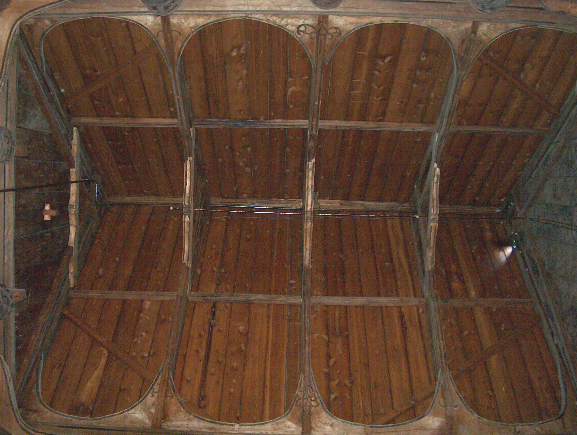 Gol stavkirke, Norsk folkemuseum (himling)